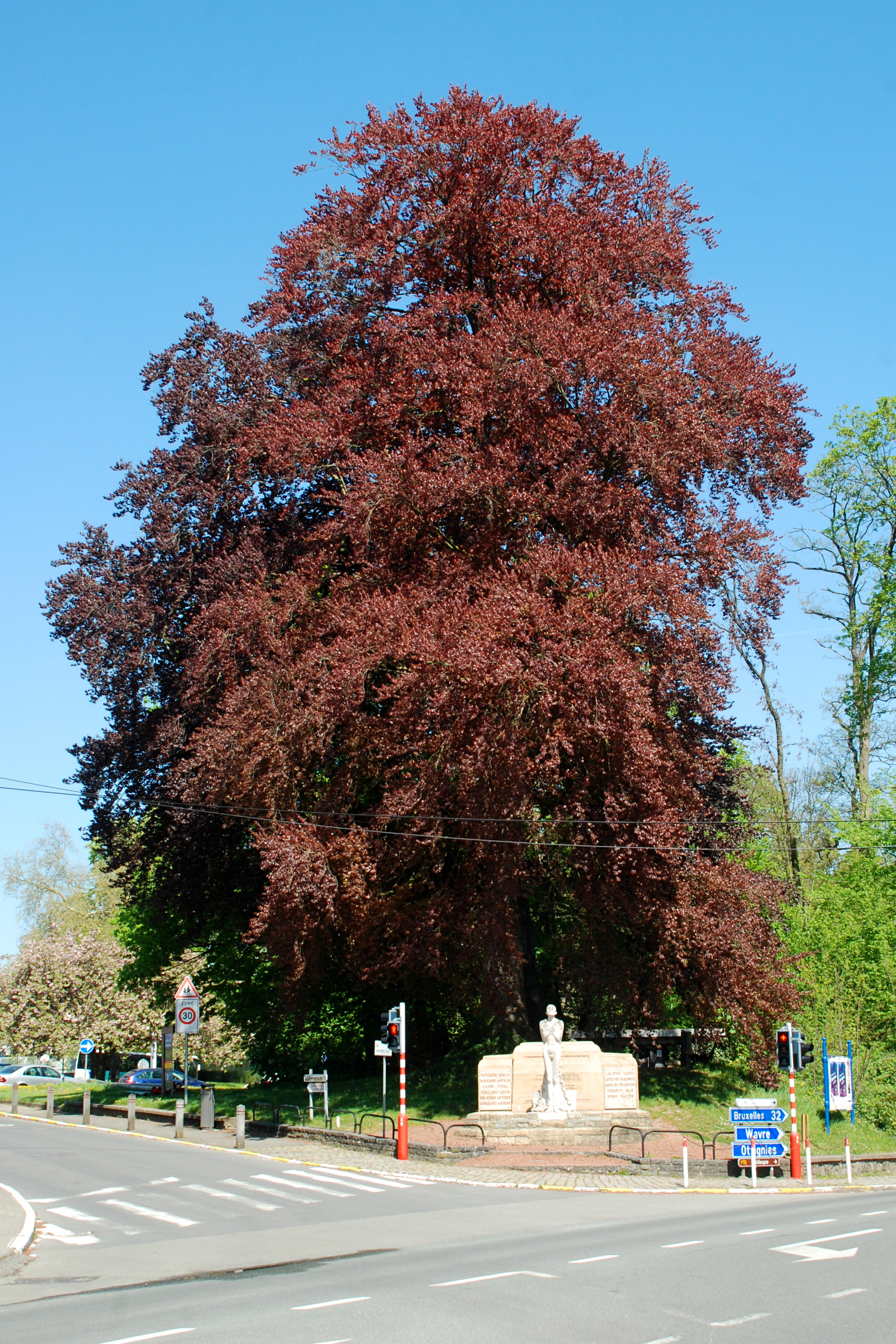 Belgique - Brabant wallon - Court-Saint-Étienne - Parc de Wisterzée